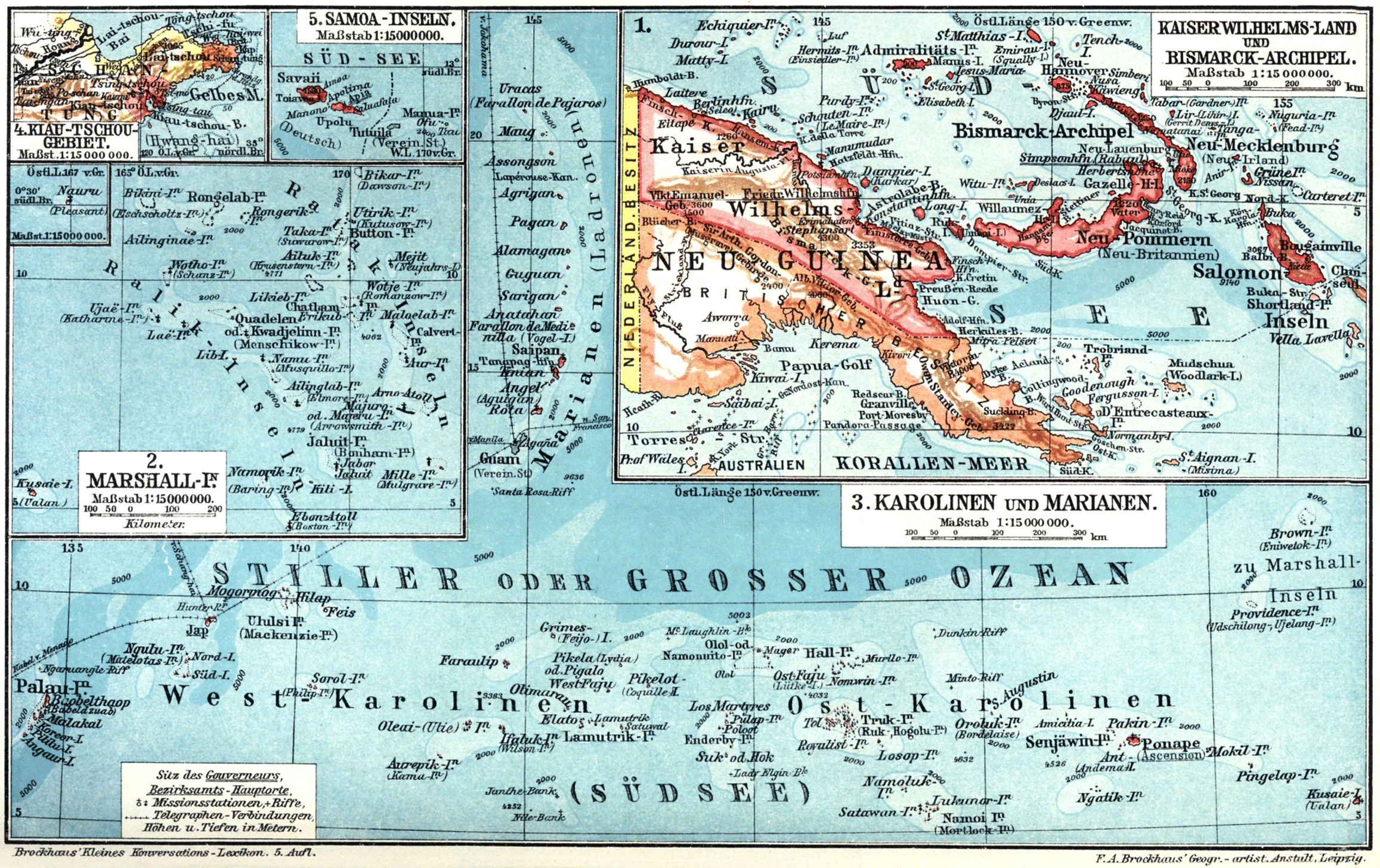 1. Kaiser Wilhelms-Land und Bismarck-Archipel. 2. Marshall-I.n 3. Karolinen und Marianen. 4. Kiau-Tschou-Gebiet. 5. Samoa-Inseln.